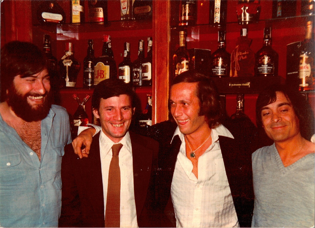 Fotografía tomada al compositor y guitarrista español Paco de Lucia, durante una de sus muchas visitas a Argentina efectuada a finales de los años 70, en el JM Café de Buenos Aires, propiedad de su amigo el empresario Esteban Romero Martín (en la fotografía situado a la derecha), natural de Villafranca de la Sierra (Ávila, España).